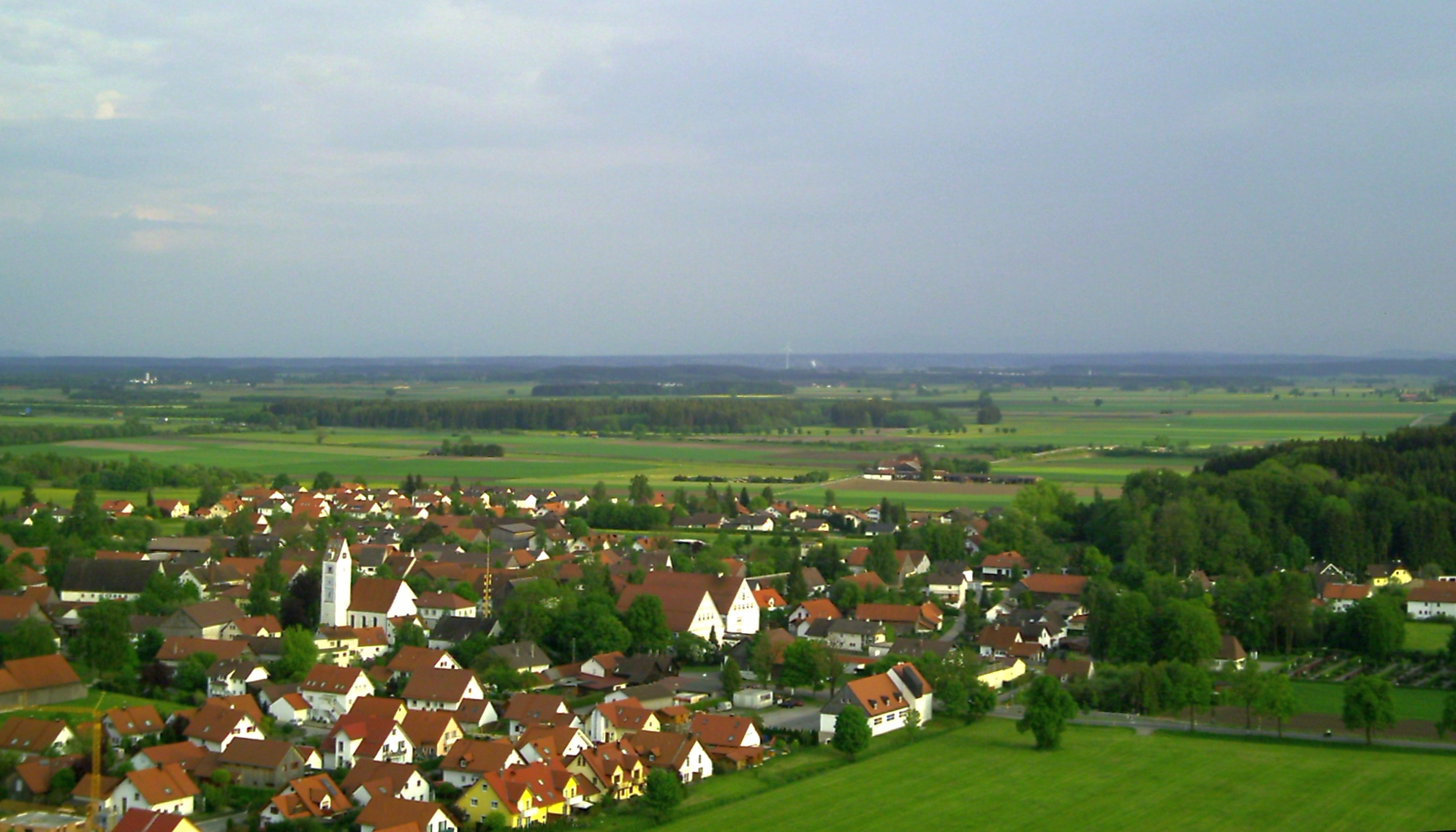 Nordwest-Ansicht von Wiedergeltingen aus etwa 100m Höhe